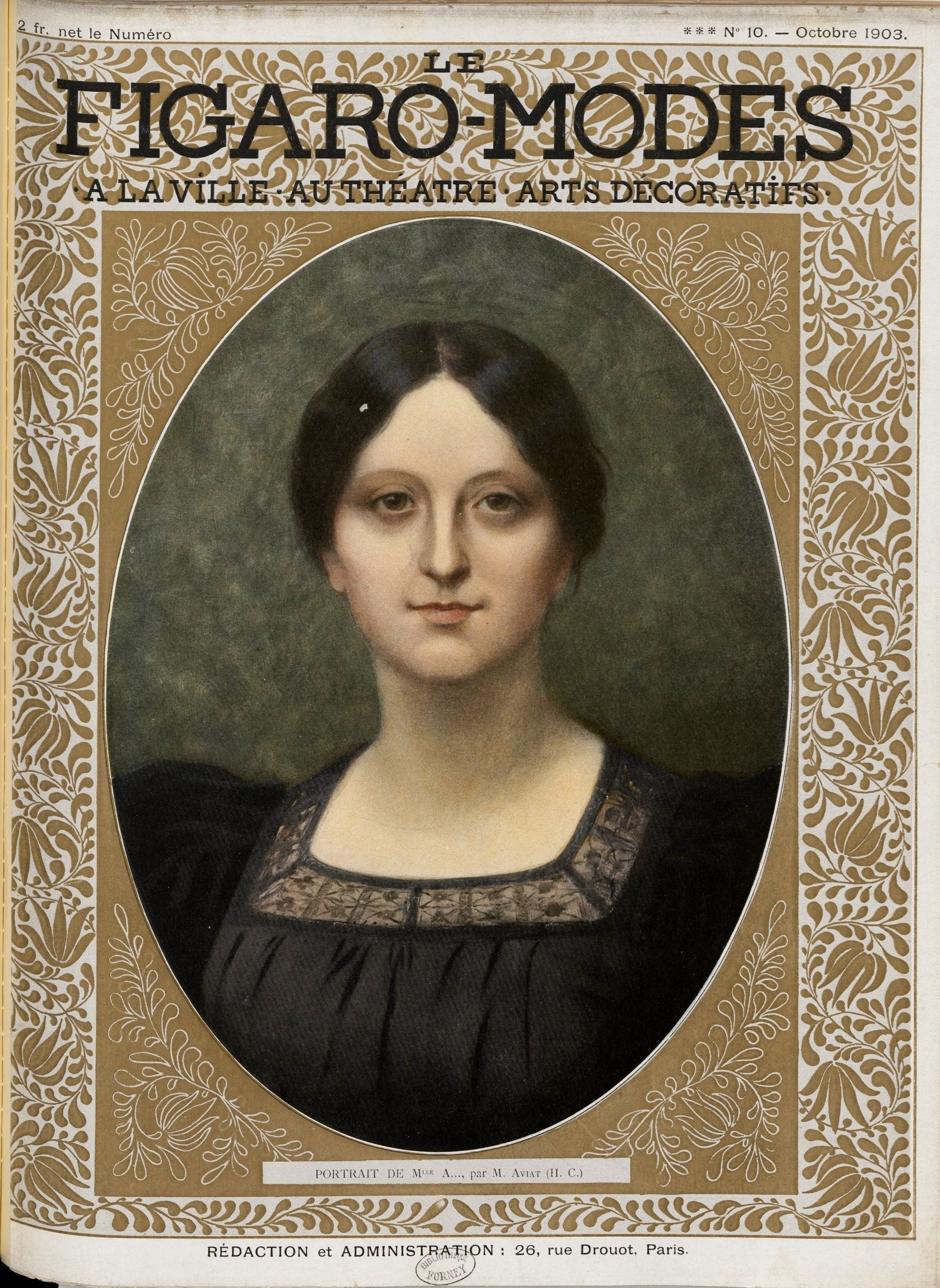 Portrait de Julie Huber, fille de Jules Aviat